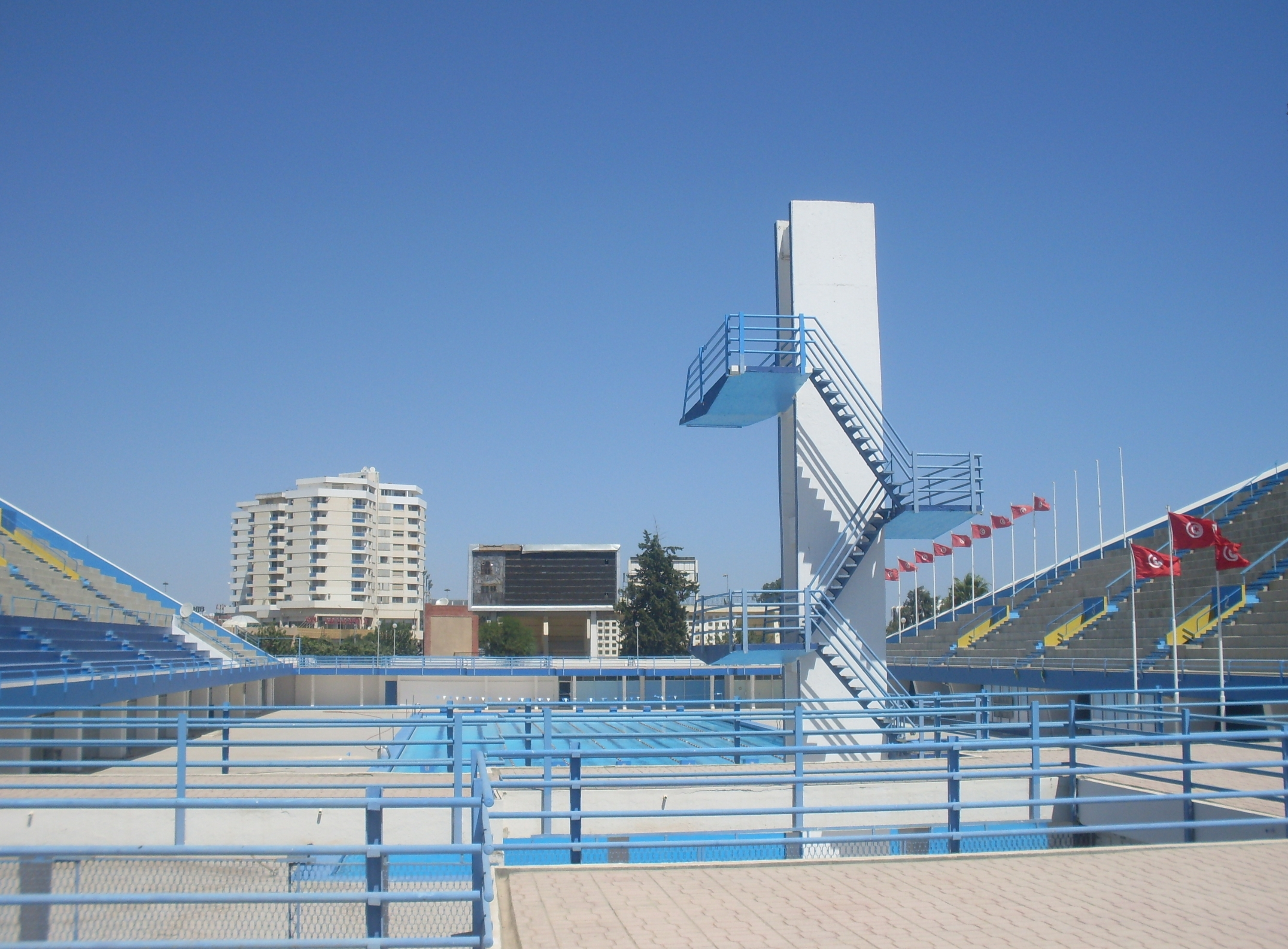 Tunis, Piscine olympique d'el Menzah